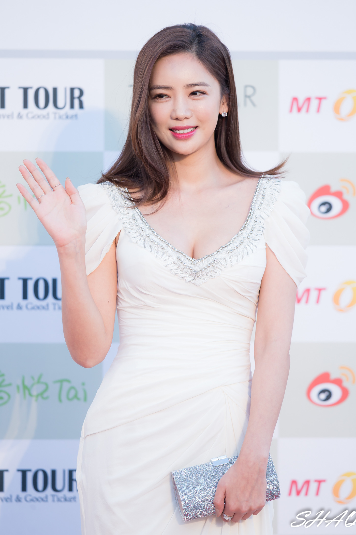 160217 가온차트 K-POP 어워드 레드카펫